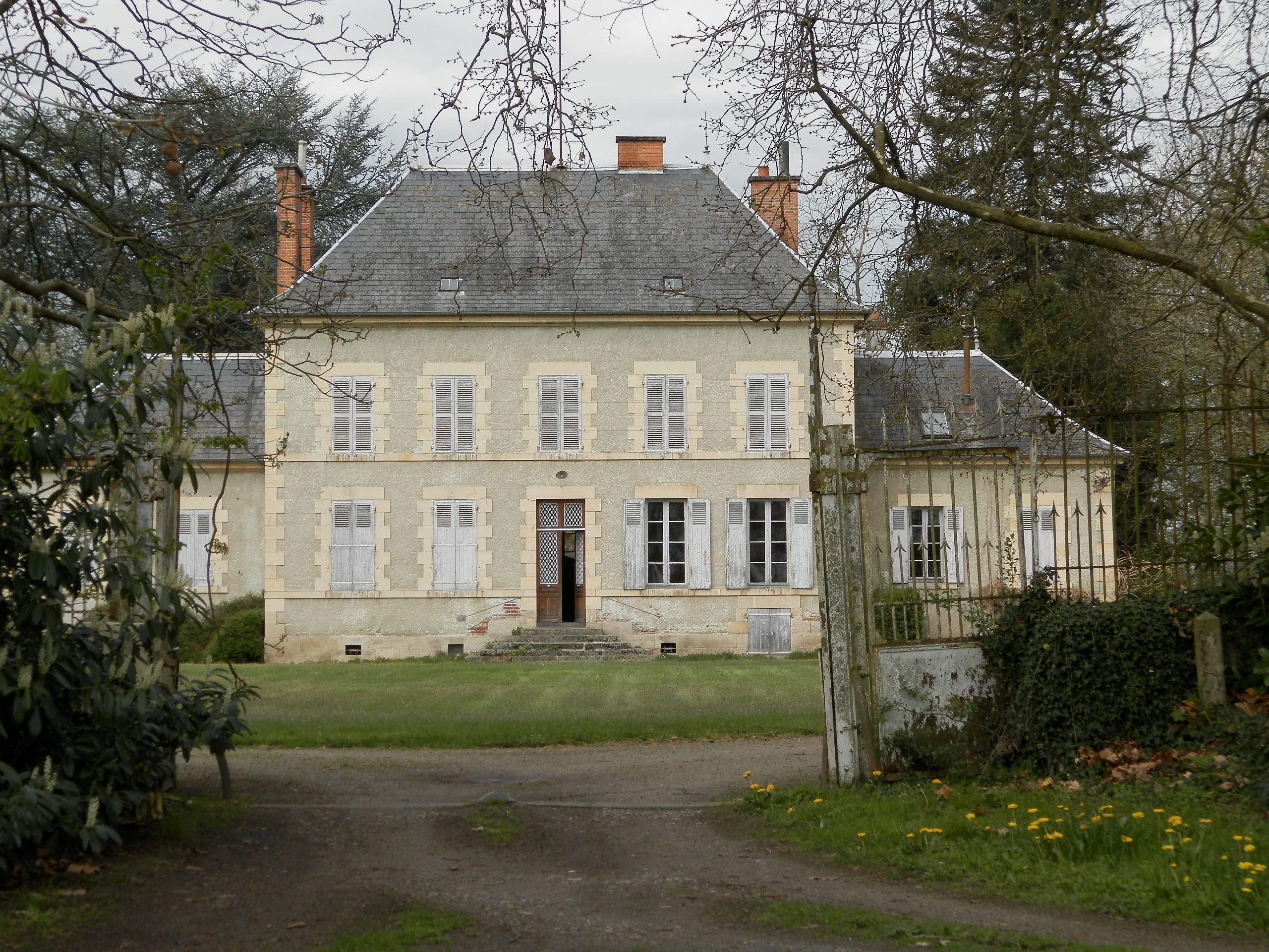 Petit chateau Bessonat